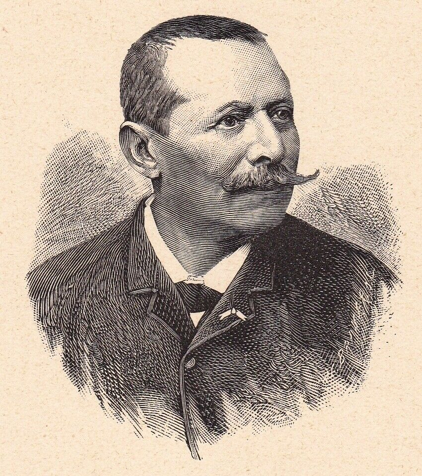 Portrait gravé de Louis Lemercier de Neuville, publié dans Angelo Mariani, Figures contemporaines de l'album Mariani, E. Flammarion (Paris) , vol. 01, page 124 (direct).